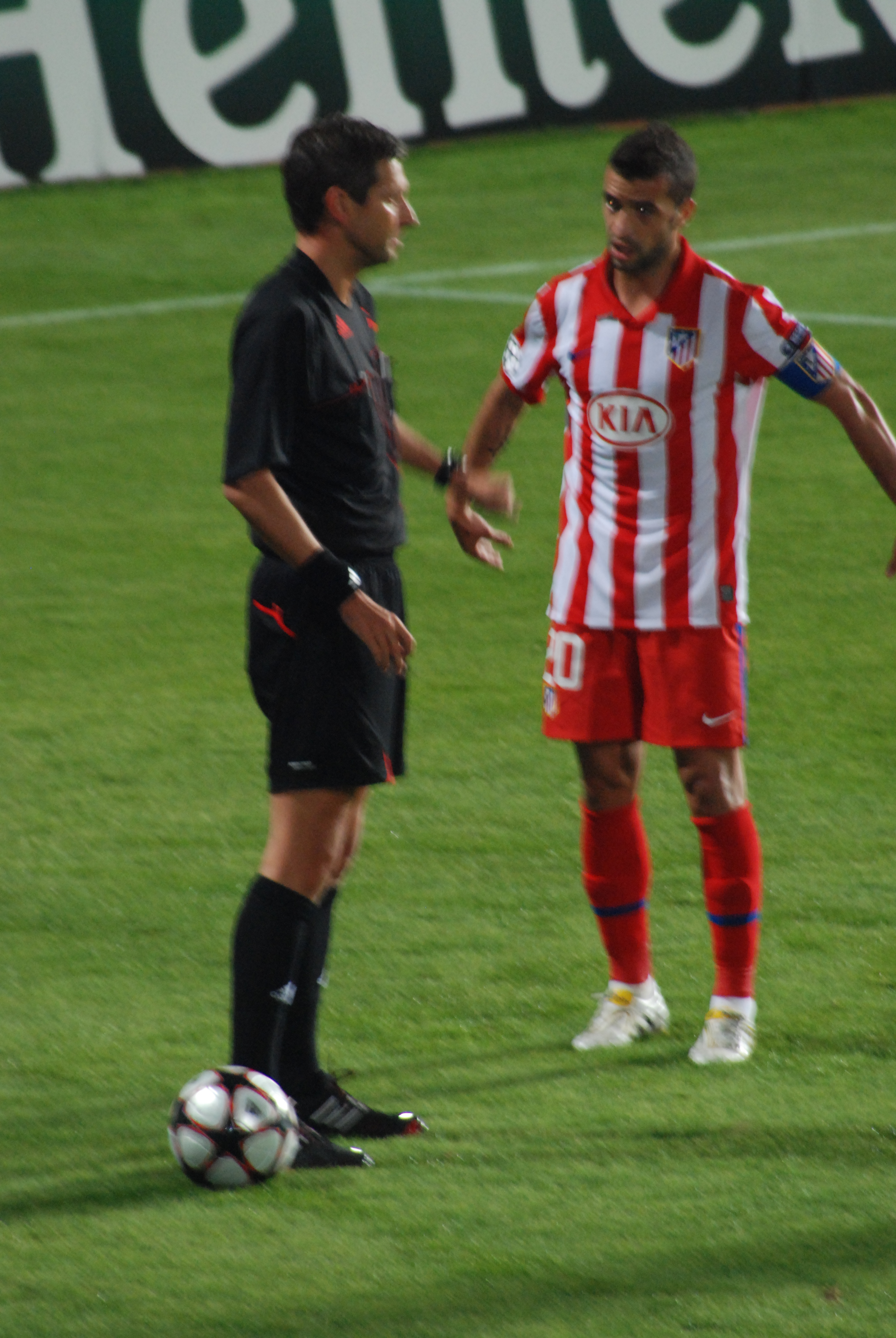 APOEL-Atlético Champions League 2009-2010